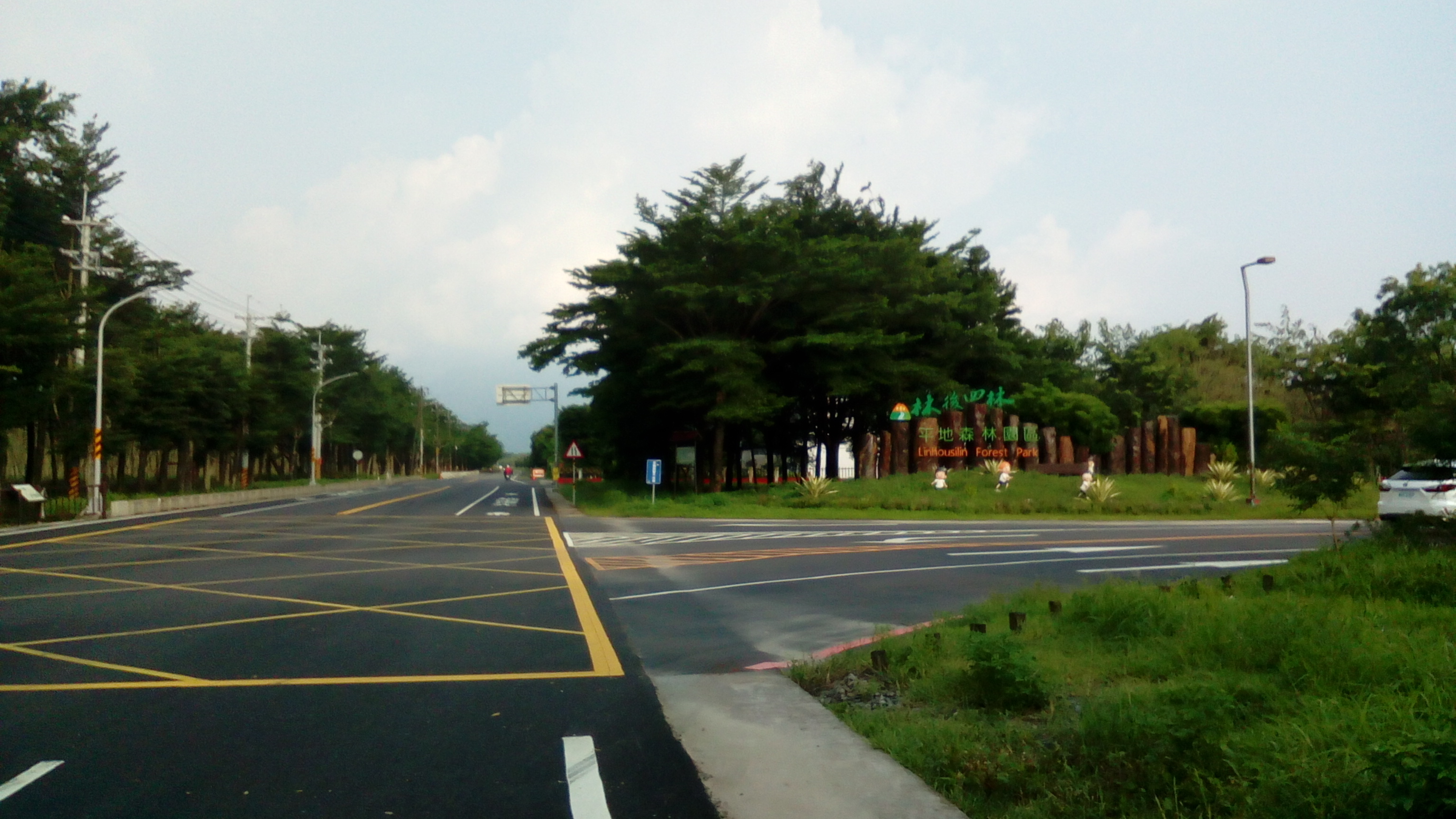 屏東縣潮州鎮185甲縣道，林後四林平地森林園區看板。